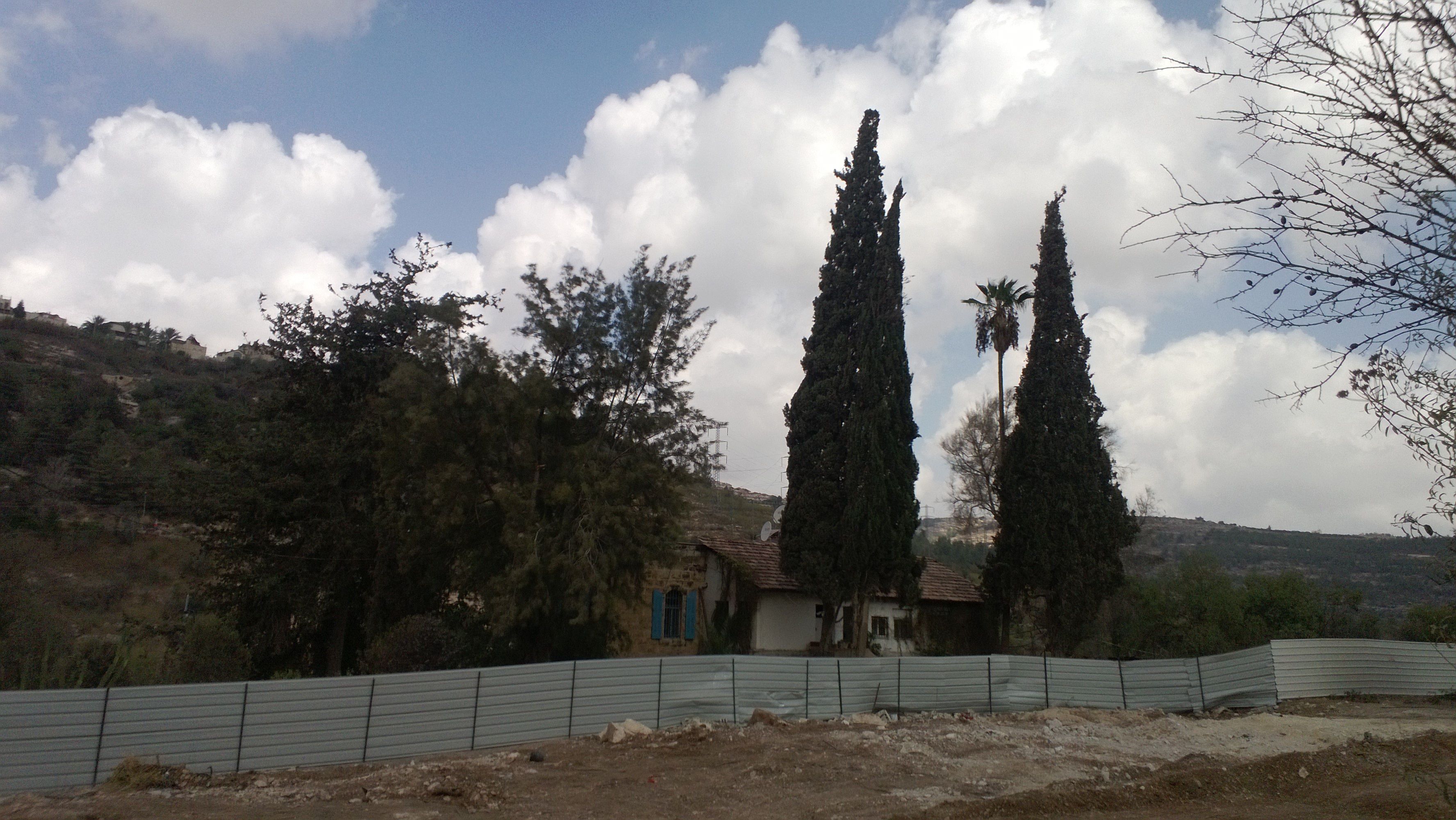 בית יהושע ילין או כבית ילין הוא הבית הראשון שנבנה במושבה מוצא, הסמוכה לירושלים. כיום משמש כמרכז מבקרים ומוזיאון לתולדות ההתיישבות במוצא.